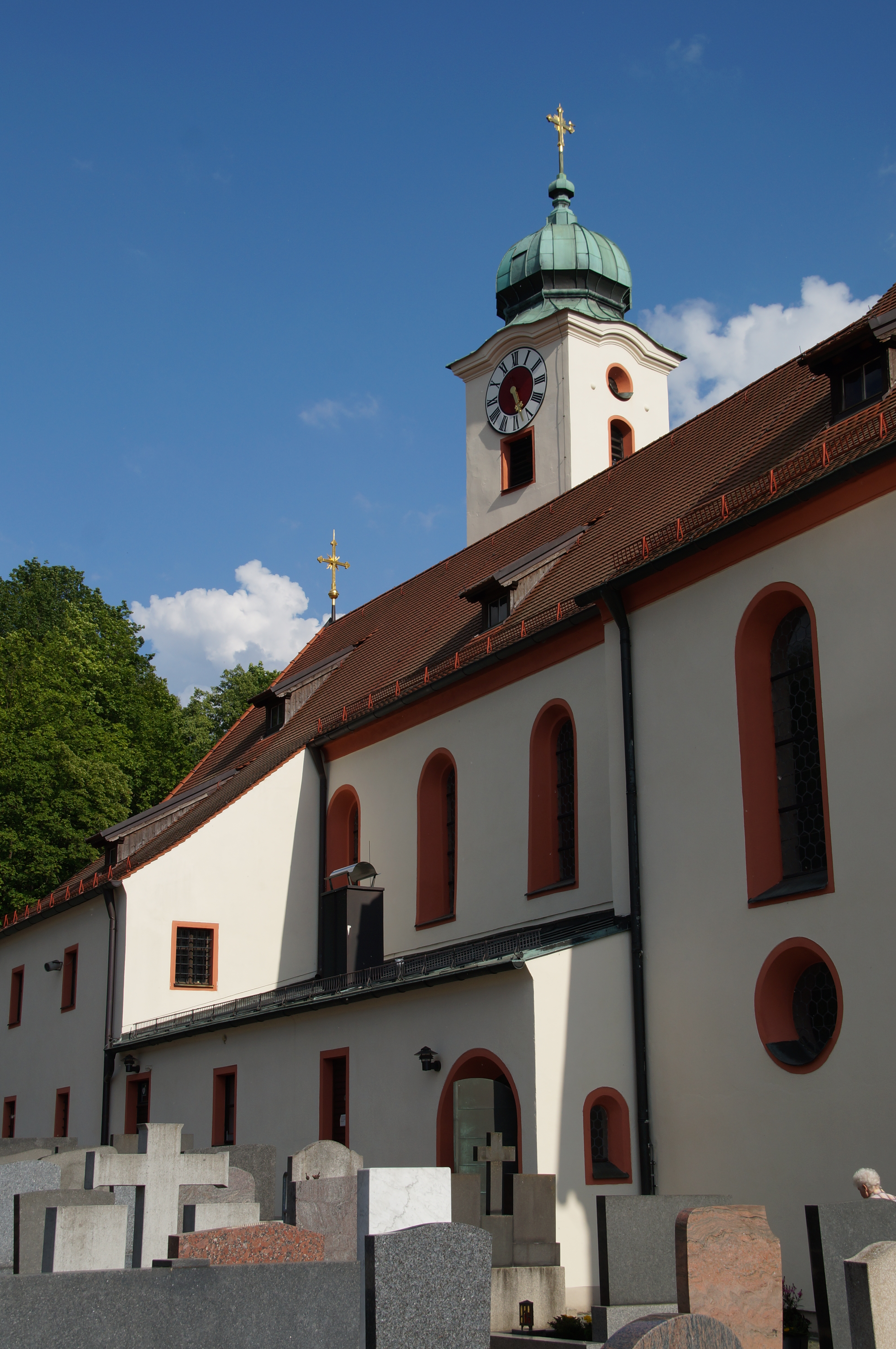 Katholische Pfarrkirche Mariä Himmelfahrt, Saalbau mit Satteldach, eingezogenem Chor und Chorflankenturm mit Haubendach, im Kern romanisch, 12. Jahrhundert, Chor 2. Hälfte 14. Jahrhundert, Langhaus im 18. Jahrhundert umgebaut, 1933 verlängert; mit Ausstattung; Friedhof mit Mauer, Bruchstein, mittelalterlich; Lichtsäule mit Tabernakel auf Schaft mit Relieftafeln, spätgotisch, Anfang 15. Jahrhundert; Friedhofskreuz, Korpus gusseiserner Viernageltypus an Kreuz aus Bandeisen, bezeichnet mit 1904